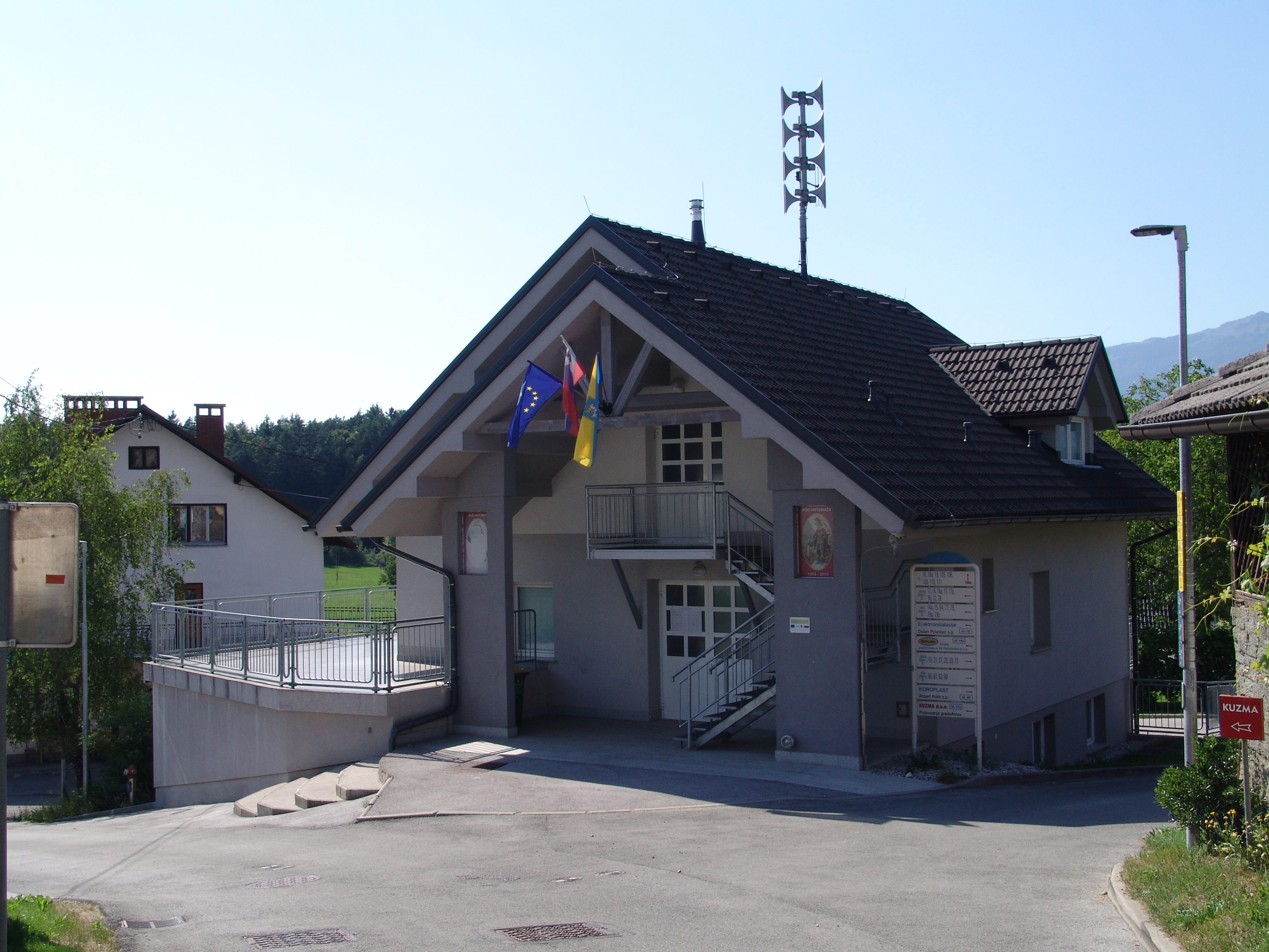 Vaško-gasilski dom v Hotemažah